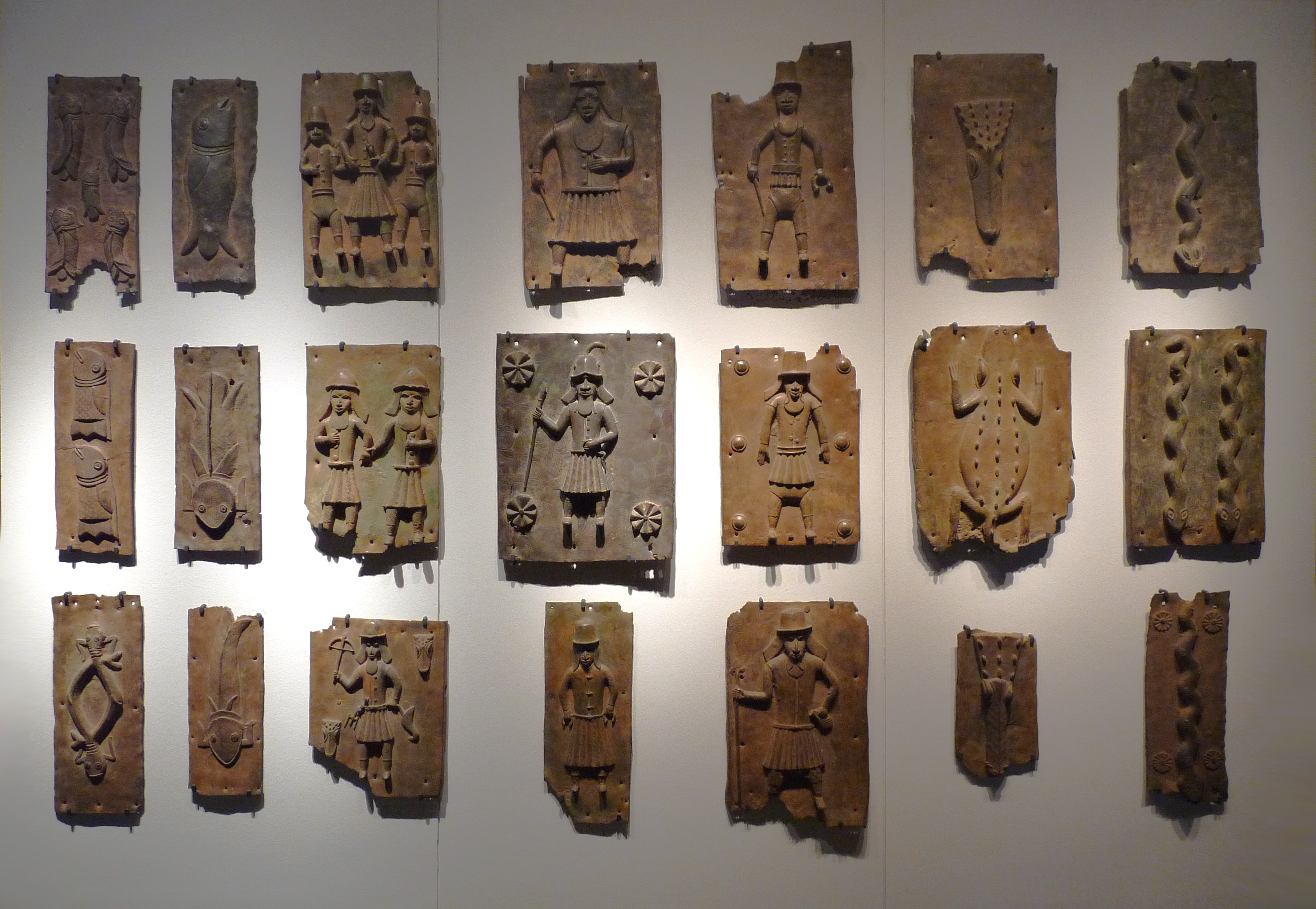 Le monde d'Olokun (dieu de la mer) : plaques de laiton en relief. 15e-17e siècle. Nigeria. (Musée ethnologique de Berlin)